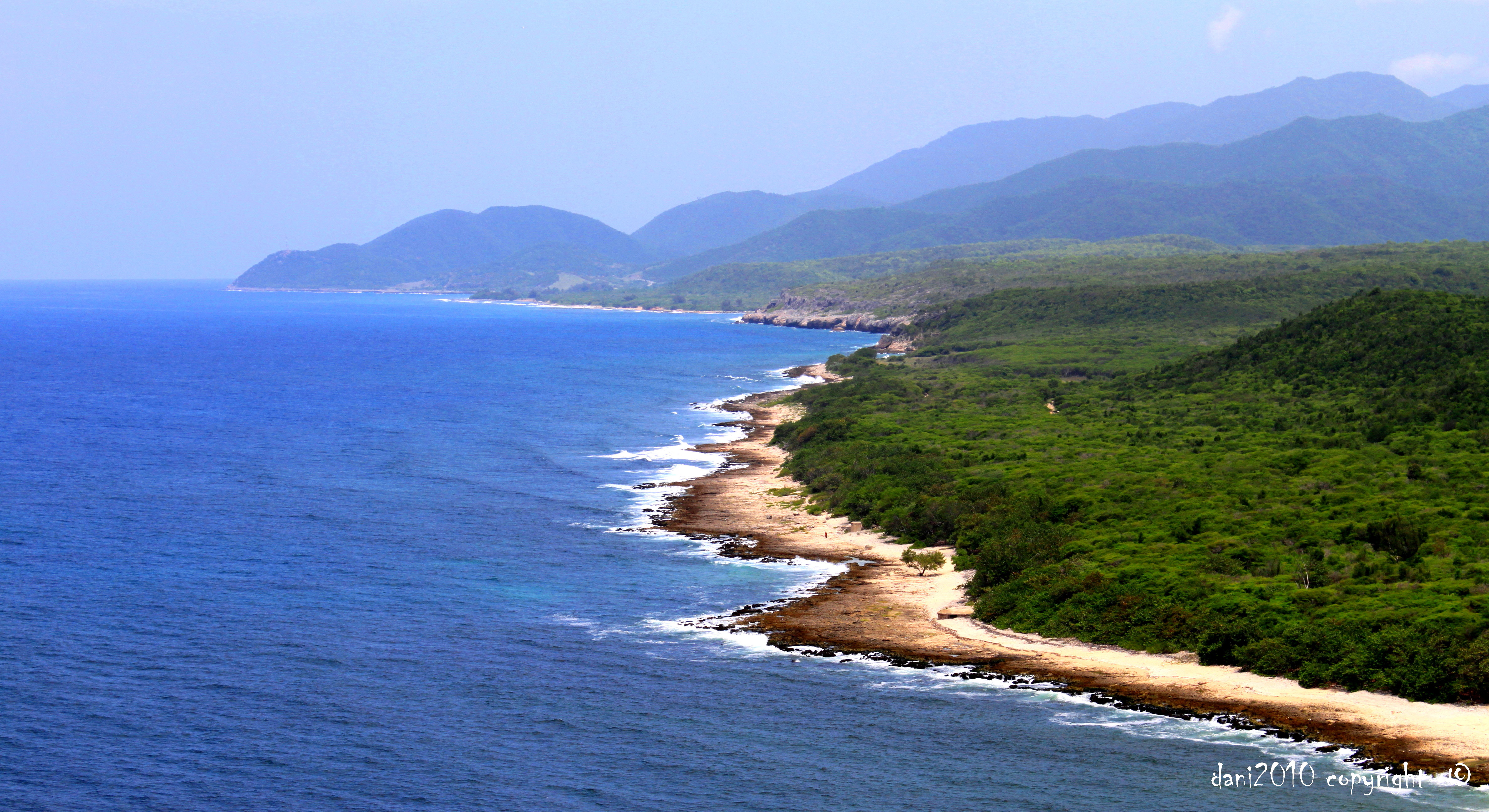 Costa de Morro vs oleaje insistente - II